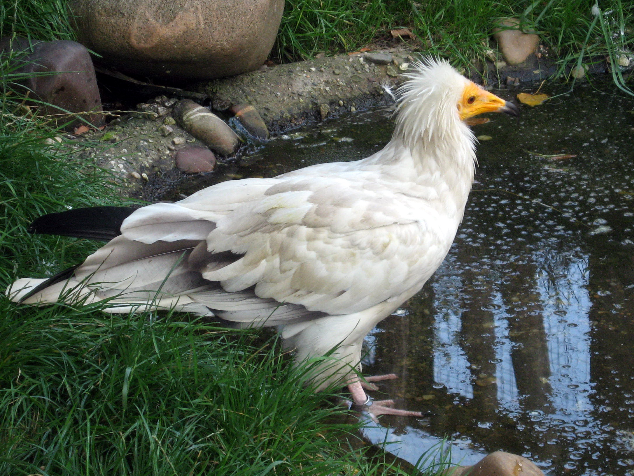 Sup mrchožravýLatina: Neophron percnopterus